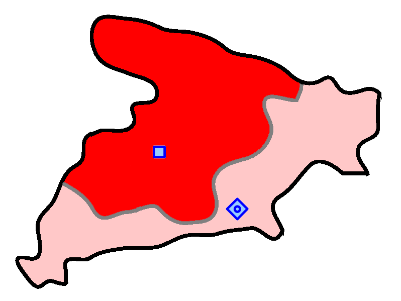 حوزهٔ انتخاباتی ساوجبلاغ و طالقان و نظرآباد برای انتخابات مجلس شورای اسلامی